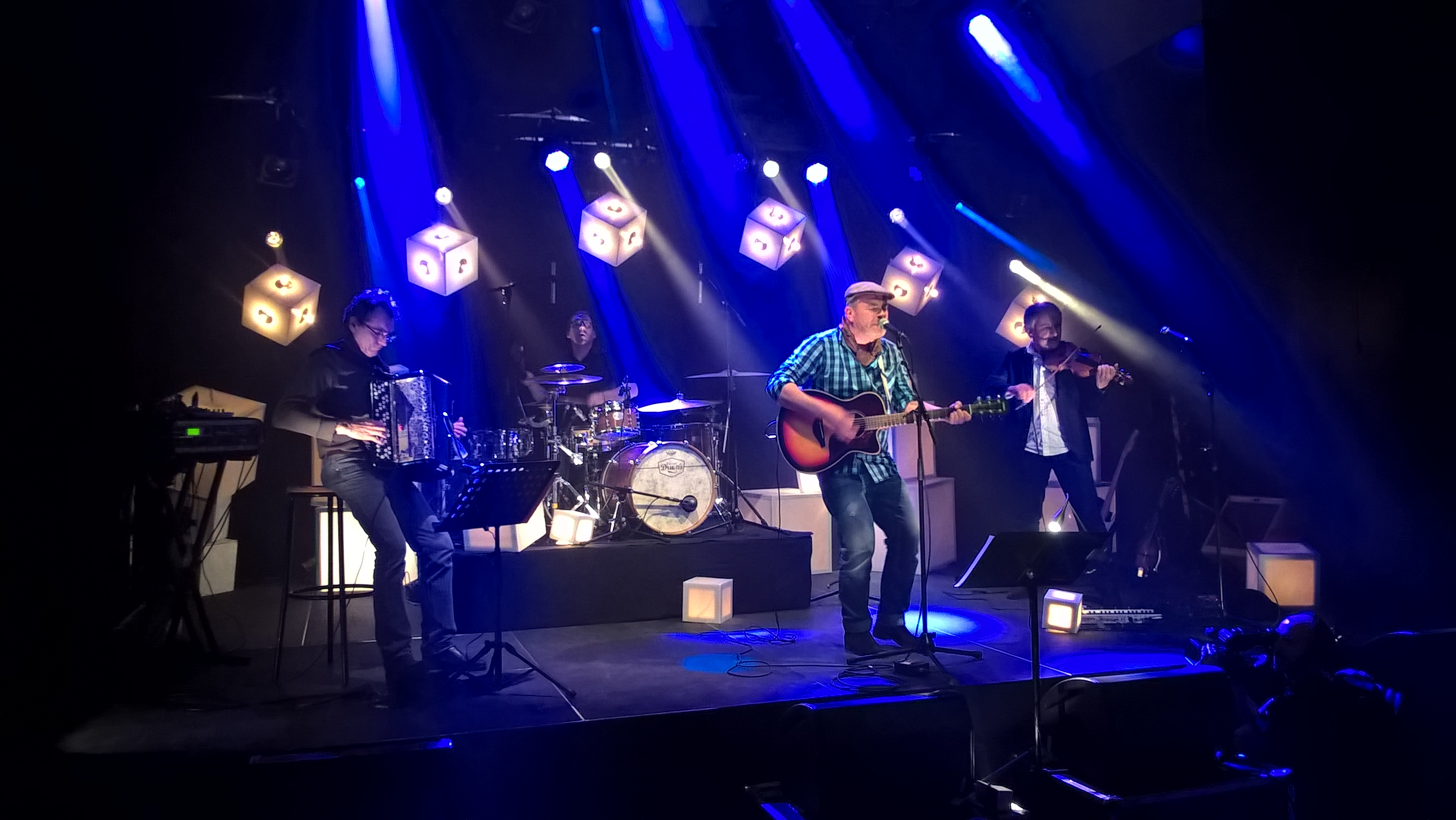 Red Cardell scène Novomax